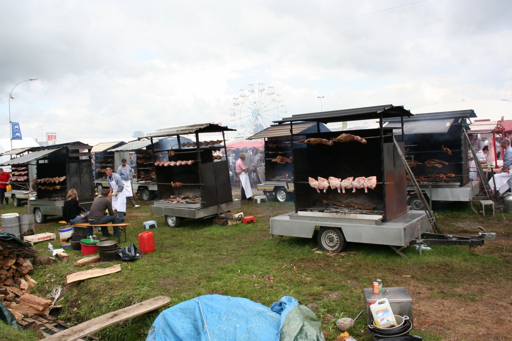 L'allée des rotisseurs à la foire de Lessay - Manche - France